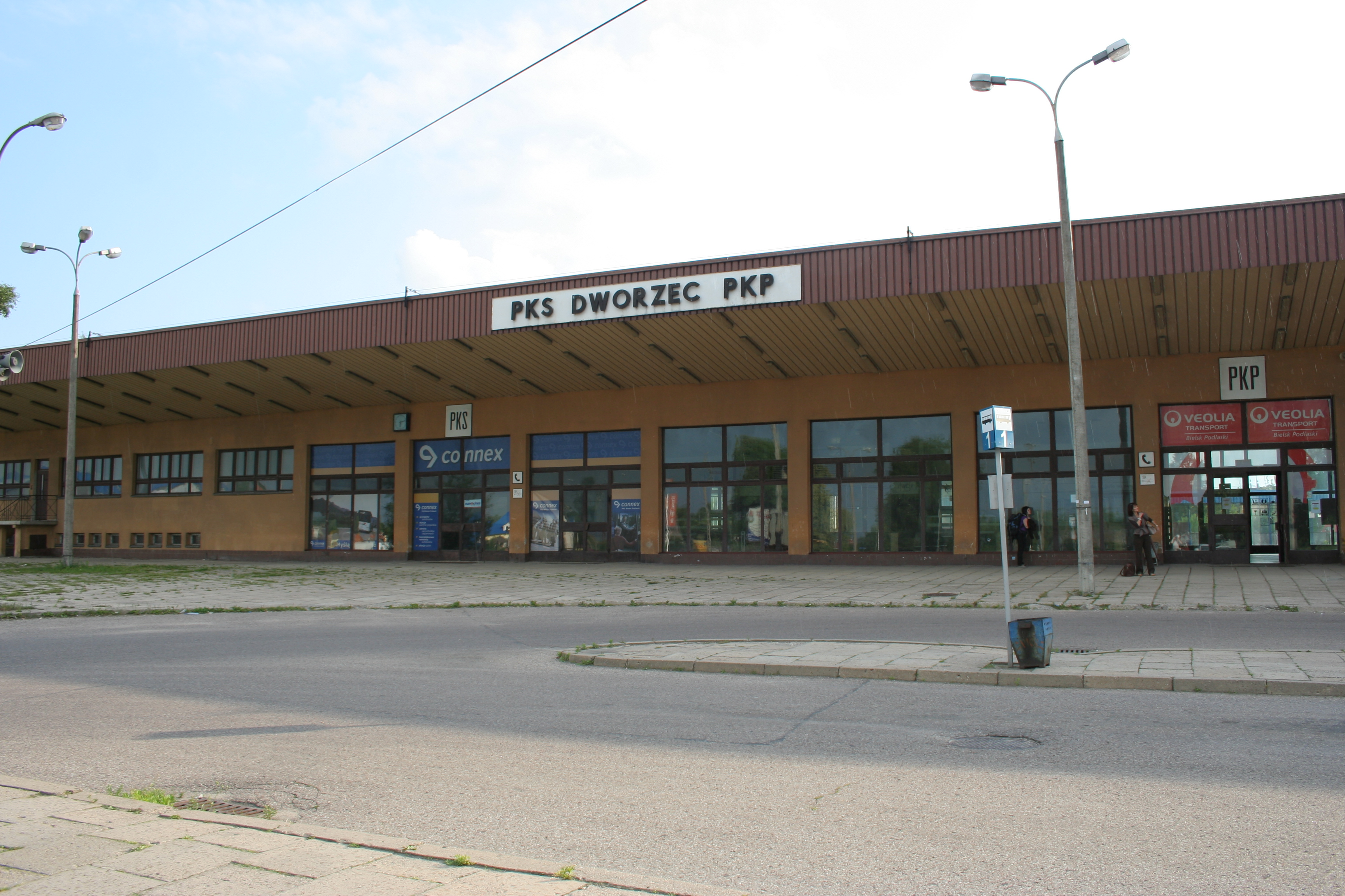 Dworzec kolejowy i autobusowy w Bielsku Podlaskim ul. Kolejowa 6.